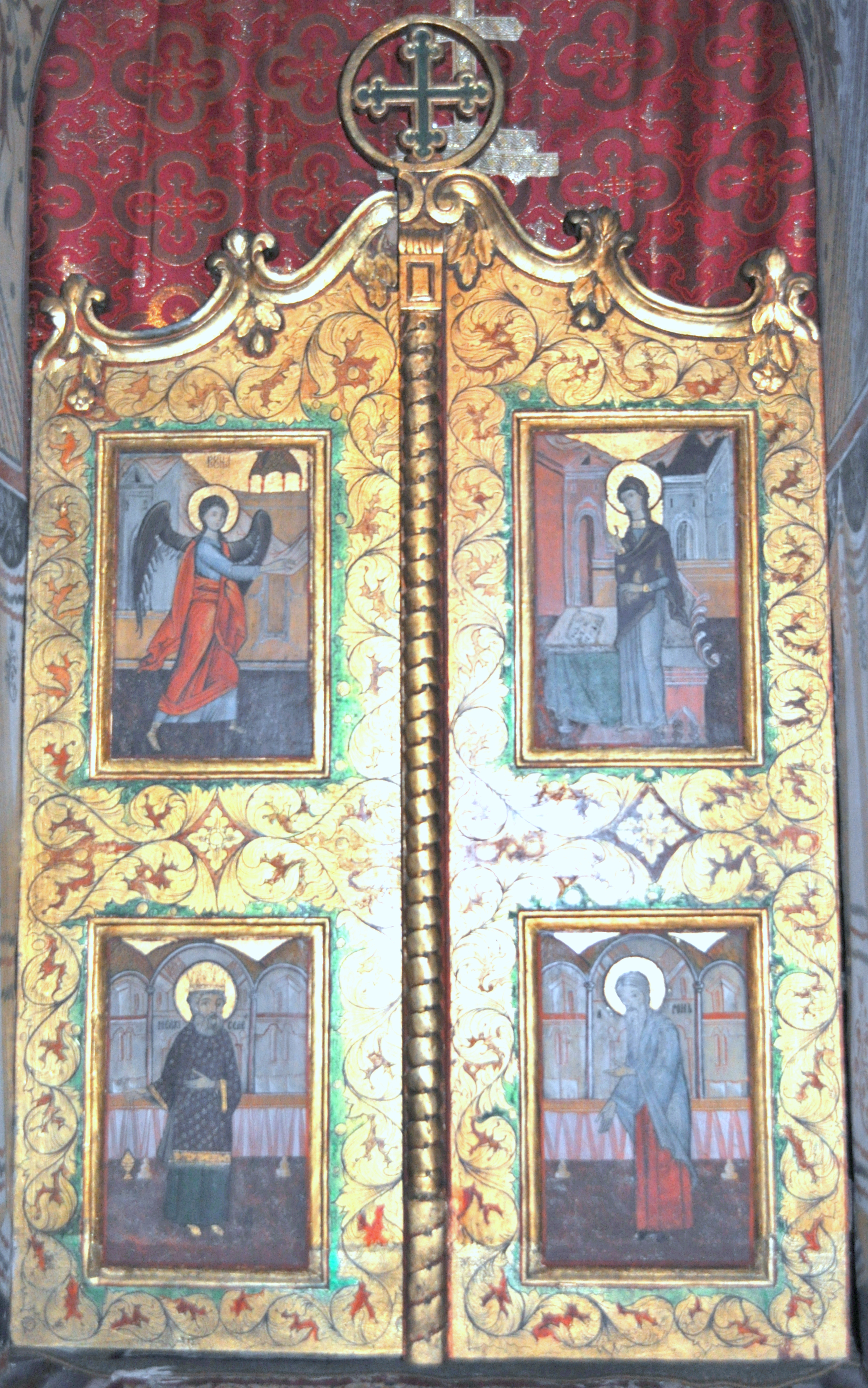 Biserica "Sf. Nicolae" din Mohu, județul Sibiu